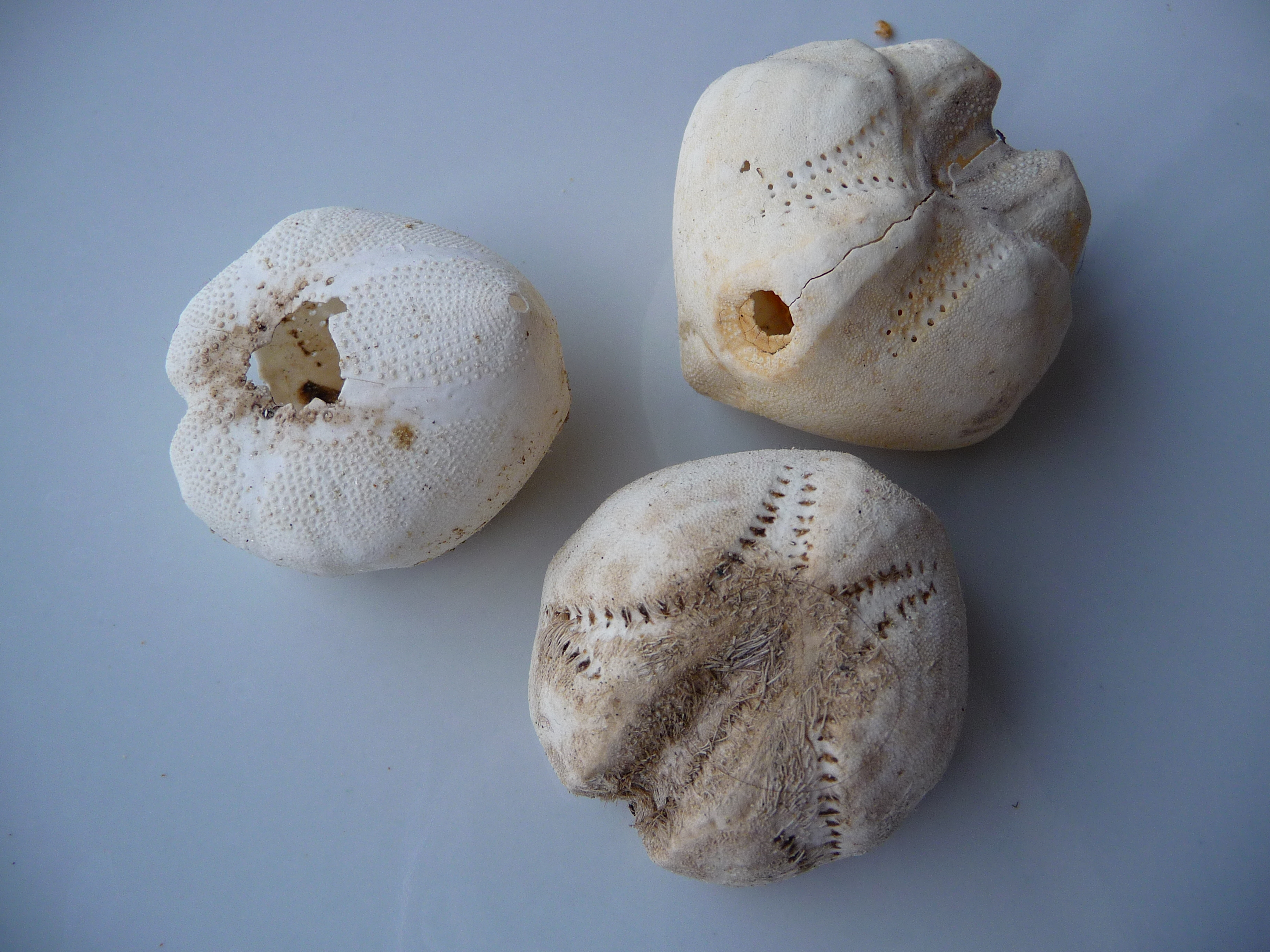 Leere Schalen von Herzigeln (auch Herzseeigel genannt)